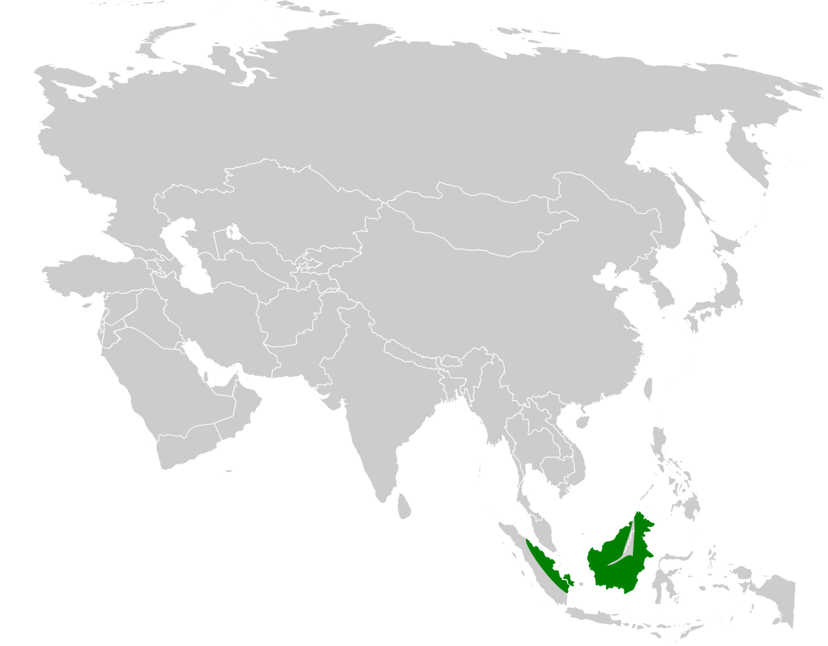 Setornis criniger distribution map, based on